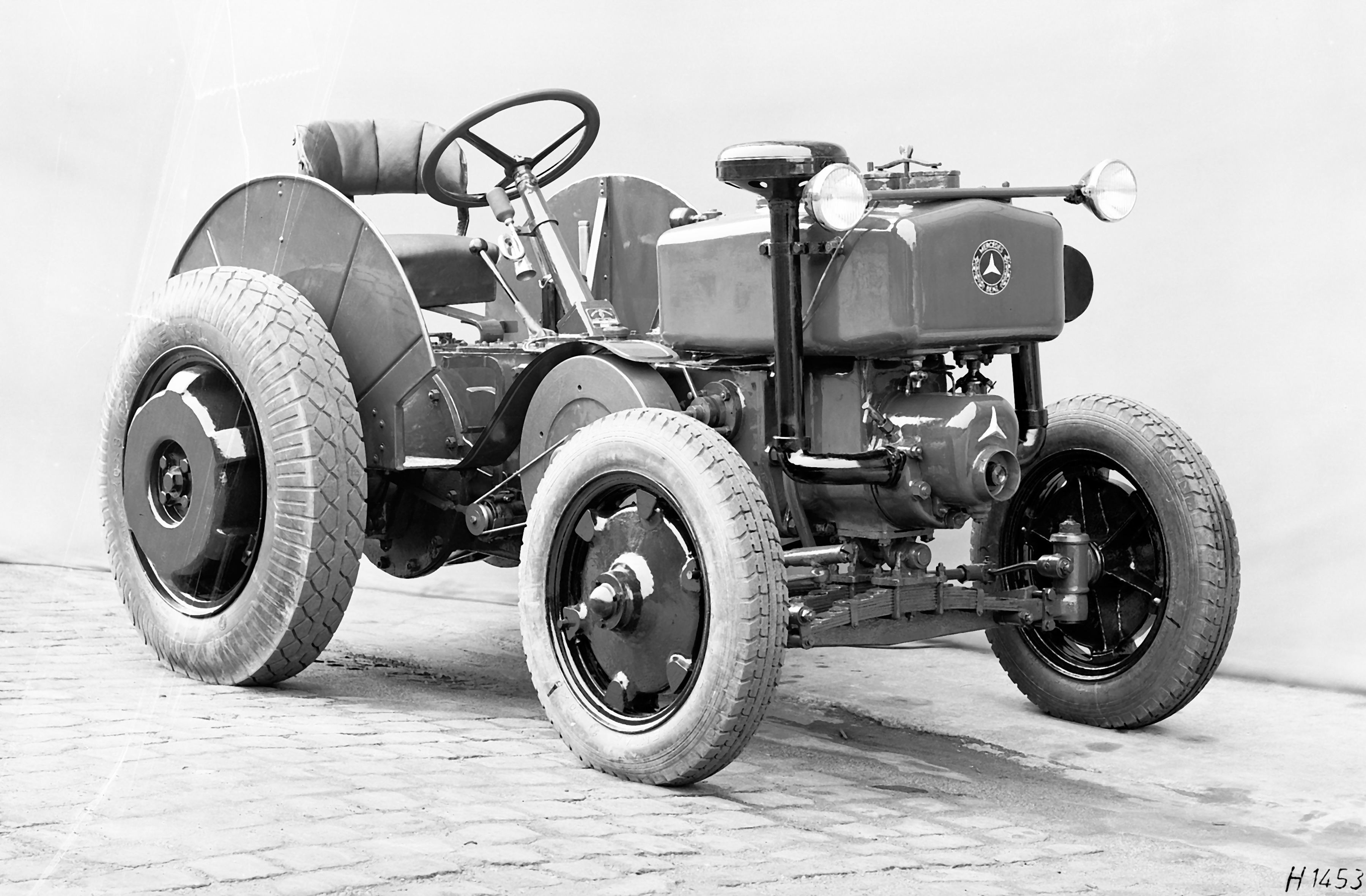 Bildbeschreibung: Mercedes-Benz Strassenschlepper OE Quelle: DaimlerChrysler AG Genehmigung: "Gern können Sie für Ihre Tätigkeit für die Wikipedia Inhalte der DaimlerChrysler Medienseiten verwenden. Dazu erkennen wir die Bedingungen nach GNU-FDL an. Das Angebot bezieht sich auch auf die vorhandenen Bilder." (Dr.Josef Ernst, Communications, DaimlerChrysler AG)